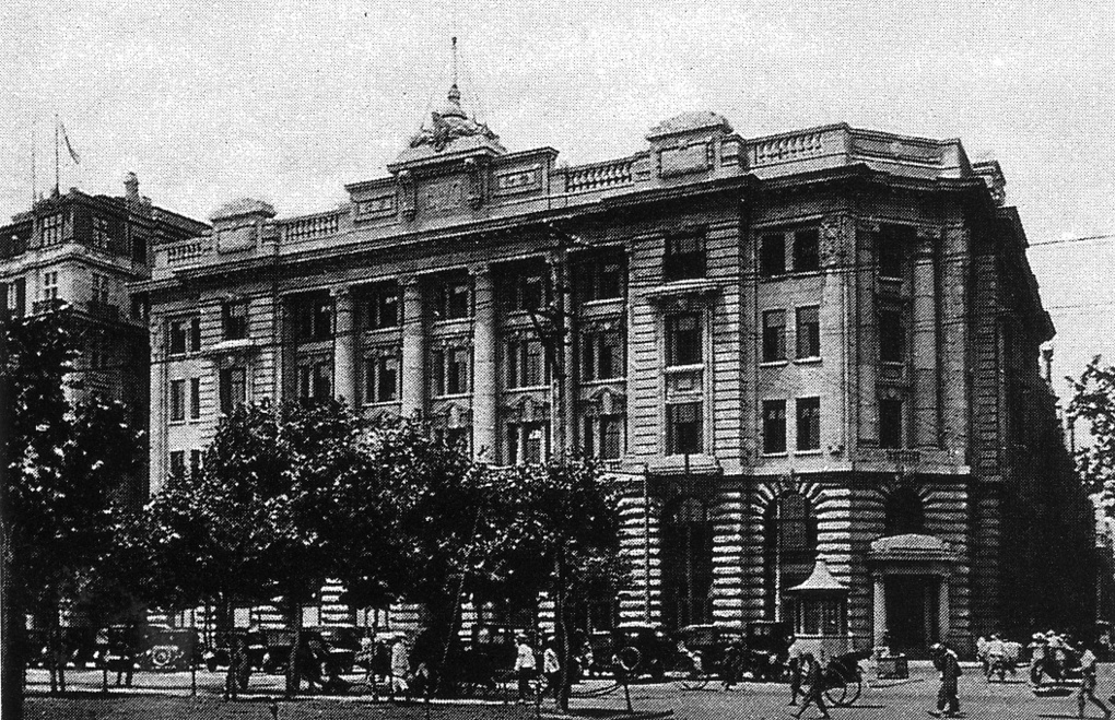 民国时期的外滩怡和洋行大楼